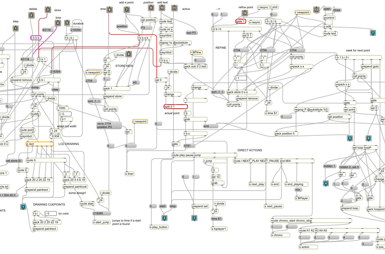 exemple d'un patch max msp